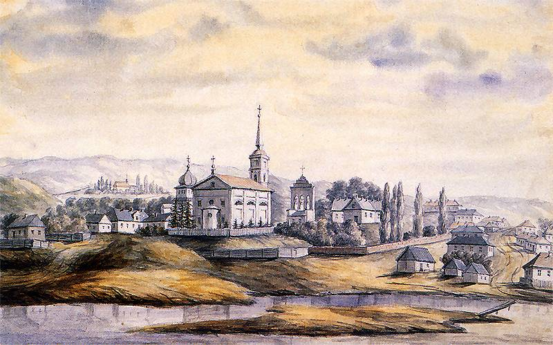 Ржищев, Тринитарский костёл Святой Троицы, рисунок 1870-х годов